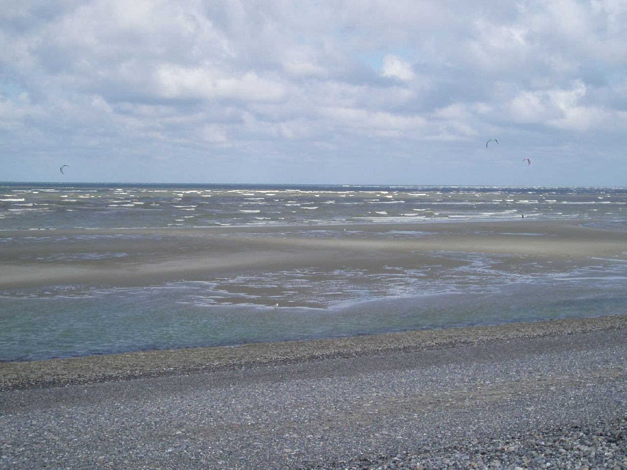 Cayeux-sur-Mer (Somme, France)